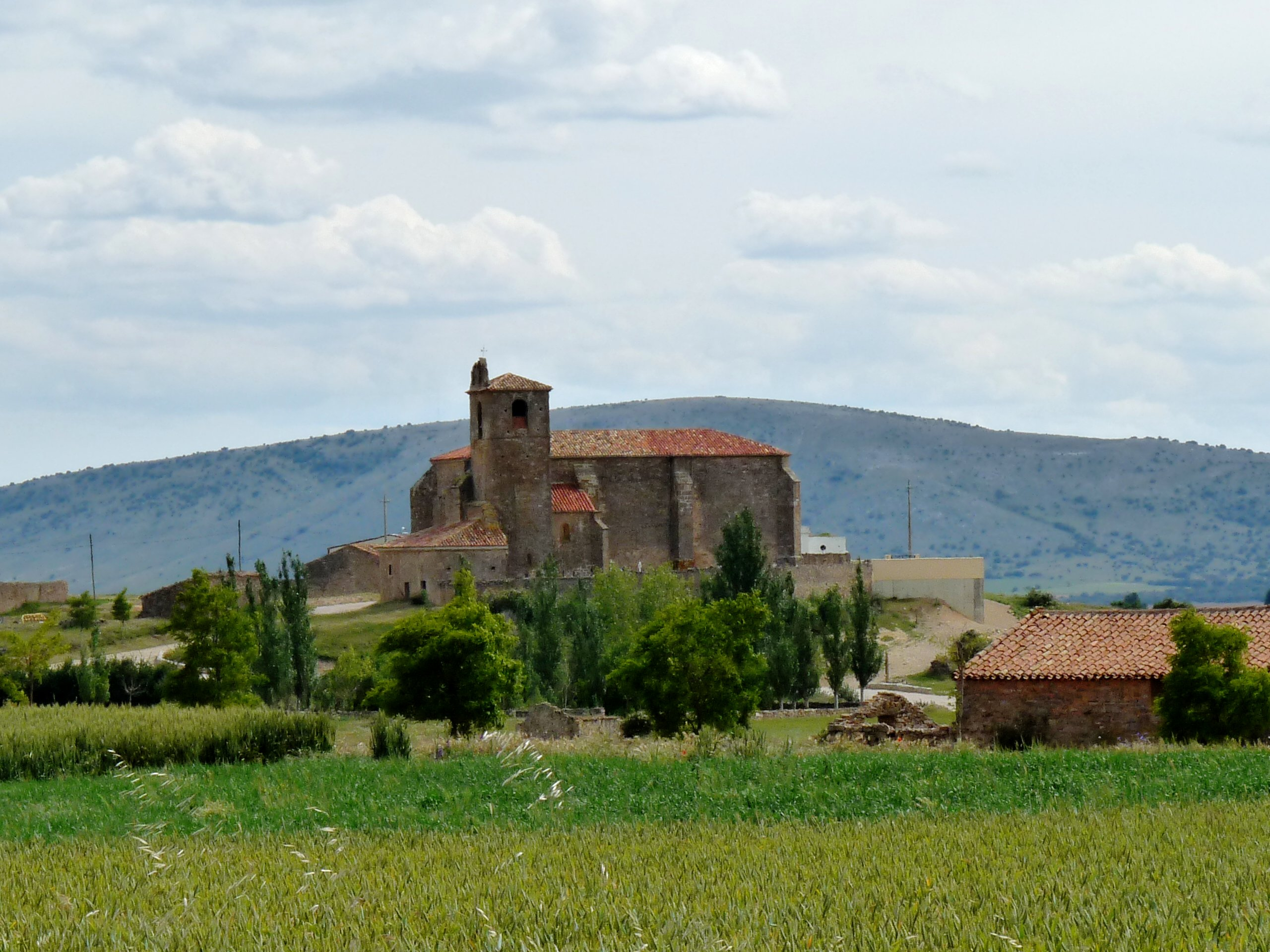 Pozalmuro - Vista general - Iglesia de Santa María la Mayor; gótico reformada en el s. XVII